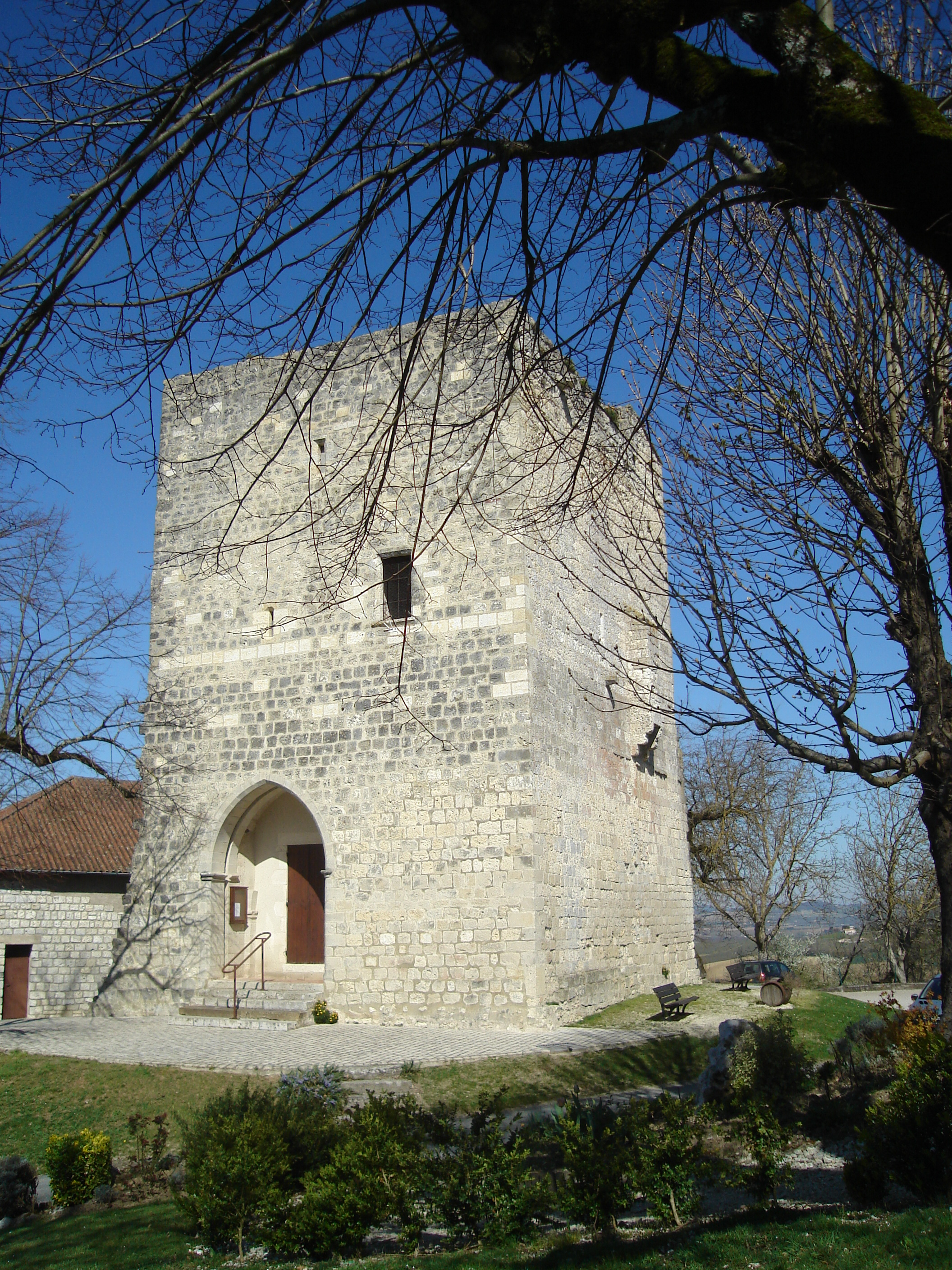 Donjon, Dolmayrac, Aquitaine, France.